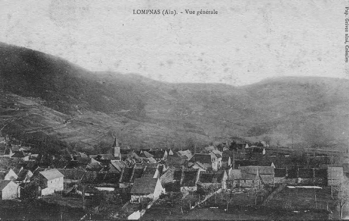 Vue de Lompnas - carte postale ancienne.